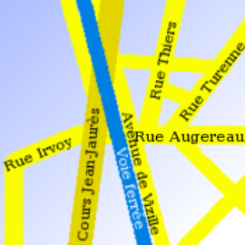 Plan du quartier de l'aigle à grenoble